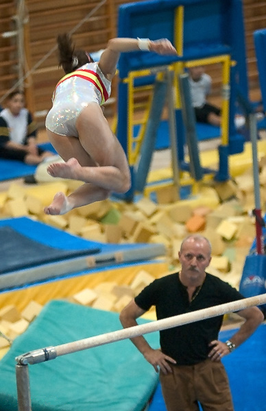 La gimnasta Patricia Moreno y el entrenador Fillo Carballo en el CAR de Madrid en 2004.